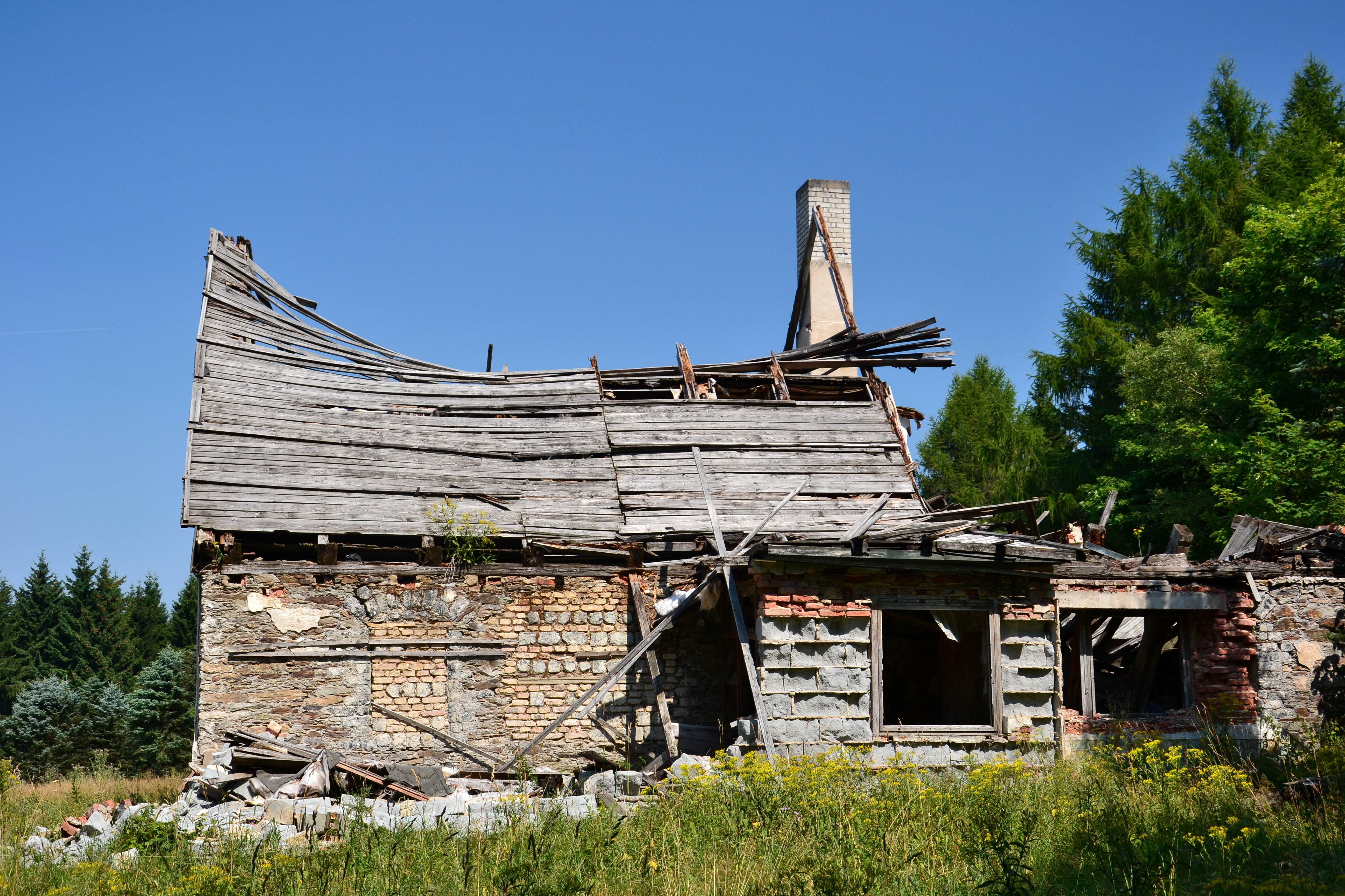 Kienhaid - nejzachovalejší dům v osadě